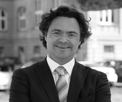 Professor Dr. Rolf Schwartmann